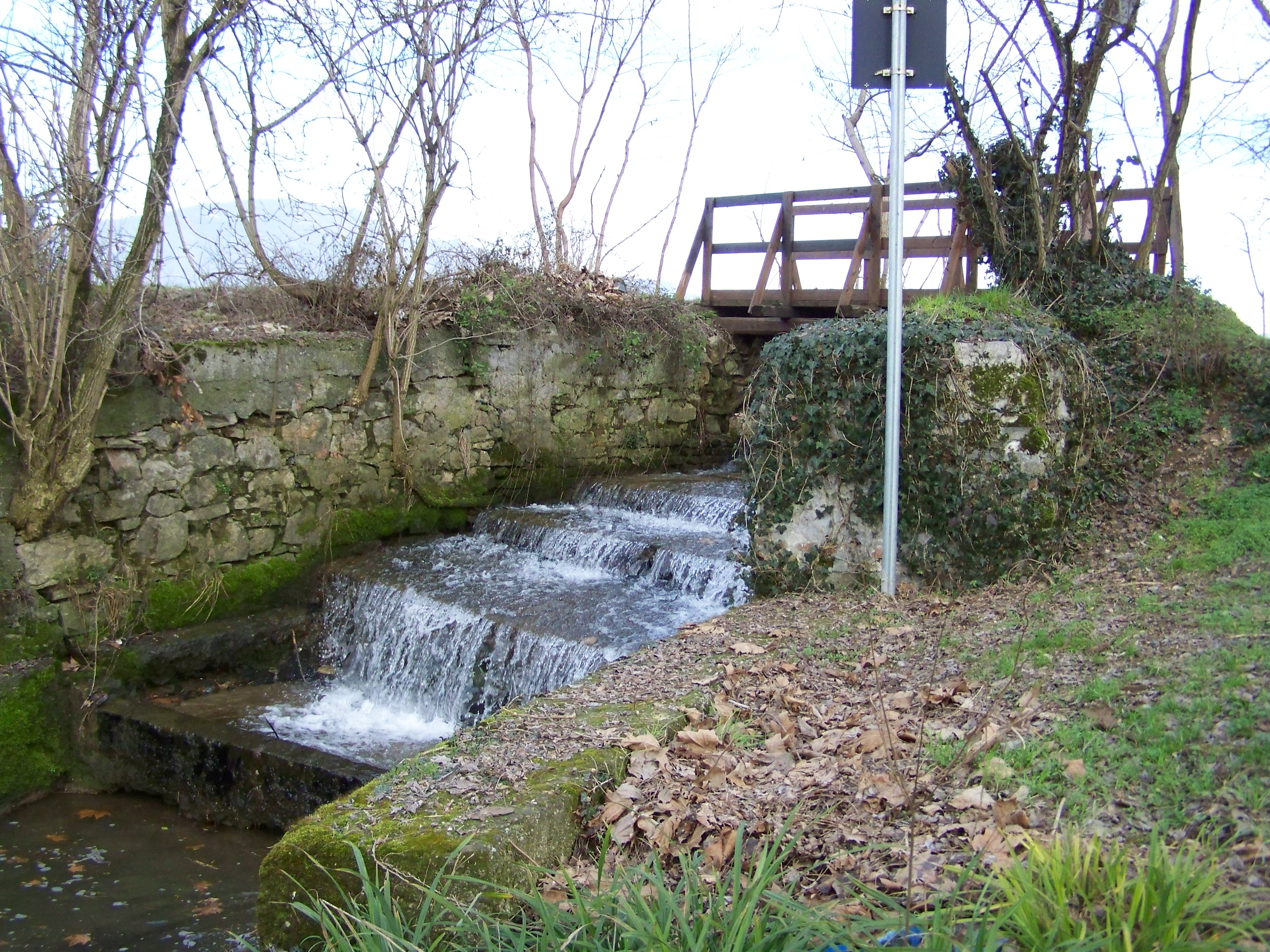 Principio del Naviglio di San Zeno